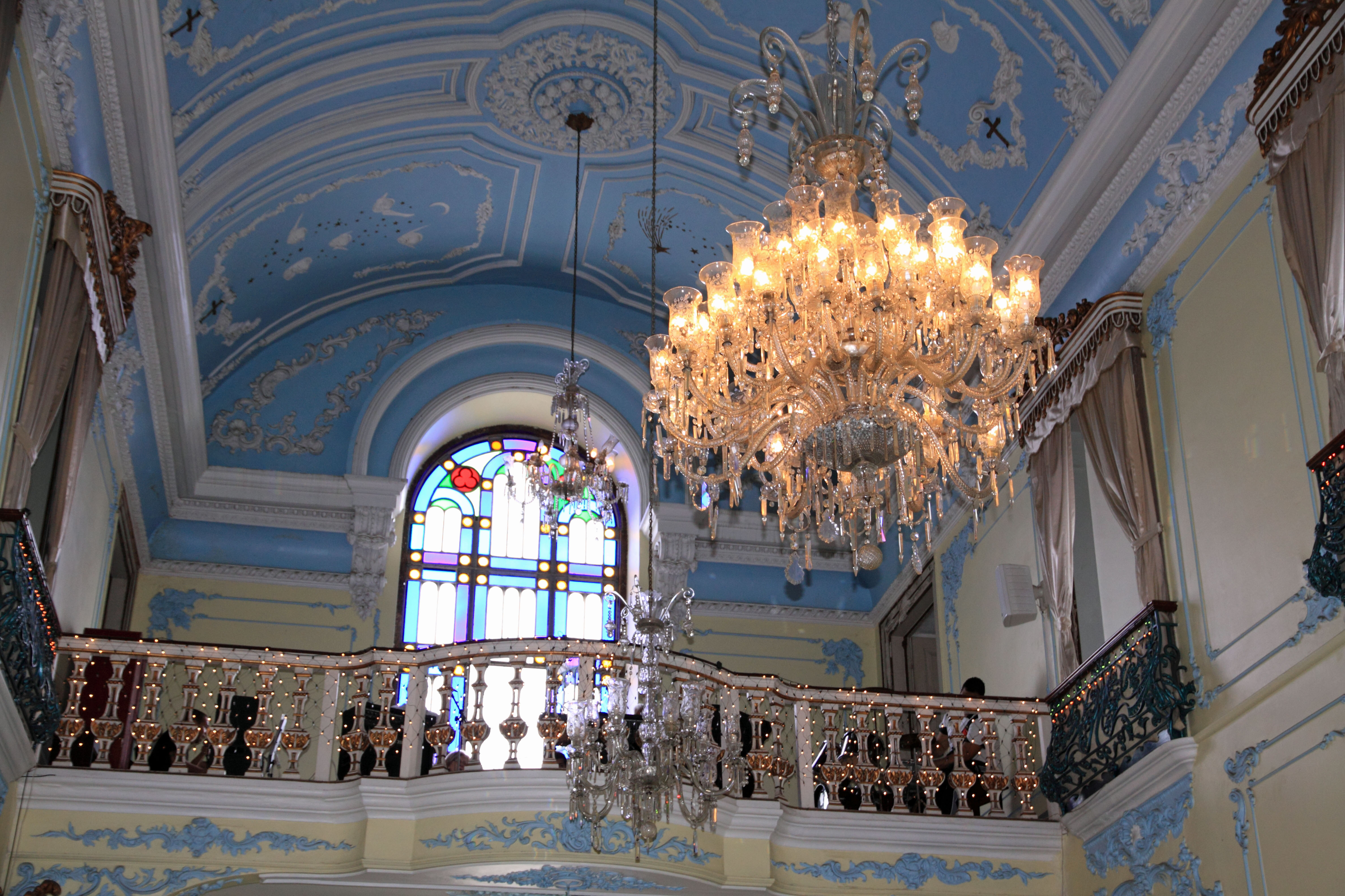 Local do coro e orquestra no fundo da Igreja da Penha.